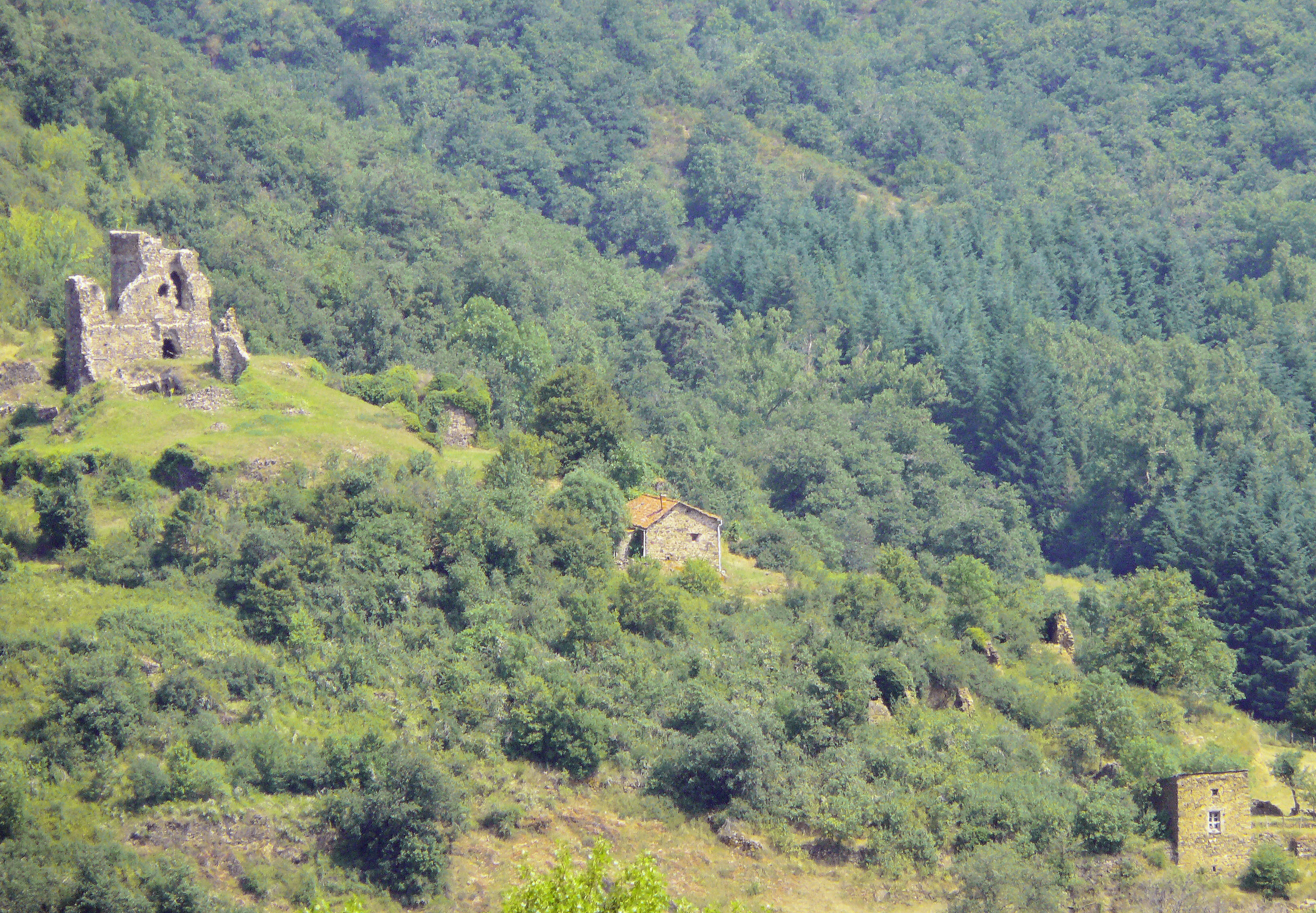 Les ruines du château de Montgon vues d'une aire de repos de l'A75